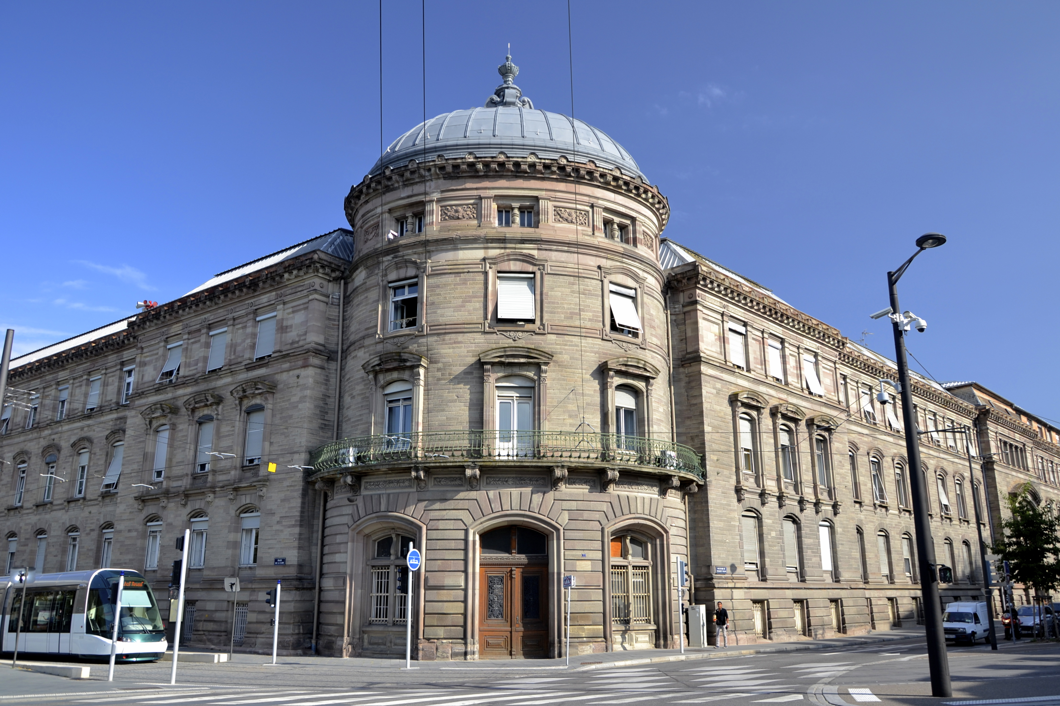 Caractéristiques Ville : Strasbourg (67000) Quartier : Halles Adresse: 1, boulevard du Président Wilson Livraison : ±1900 Fonction : Bureaux Données techniques Niveaux : R+3 Hauteur : ±15.00 m